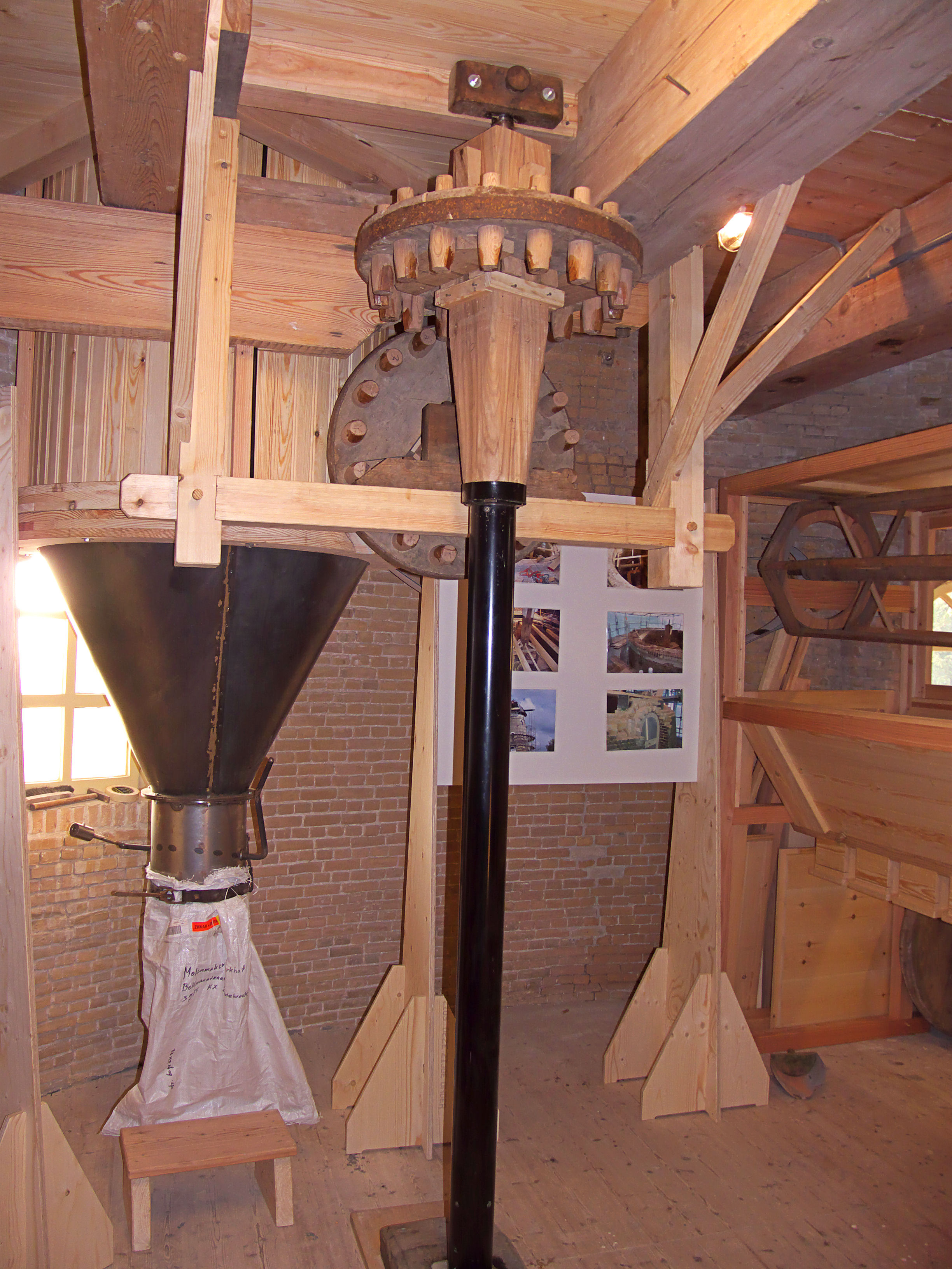 Molen De Korenbloem, Kortgene, aandrijving buil en mengketel